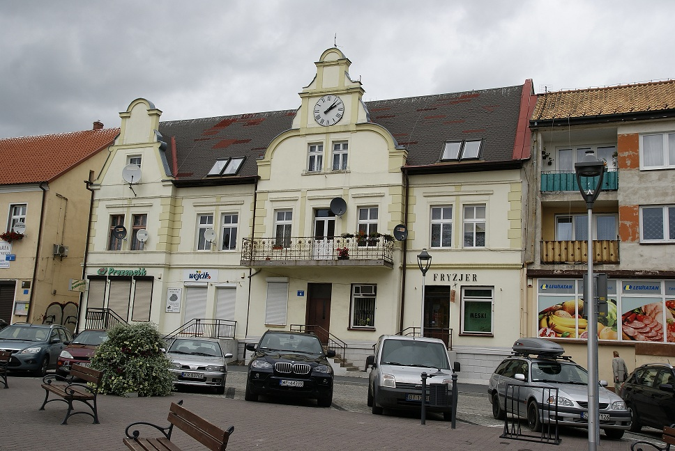 budynek mieszkalno-usługowy Mikołajki, Plac Wolności 4, Mikołajki (miasto)